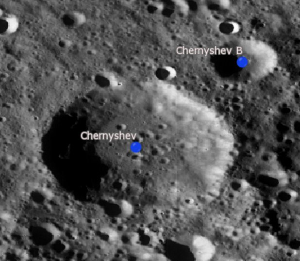 Cráter Chernyshev